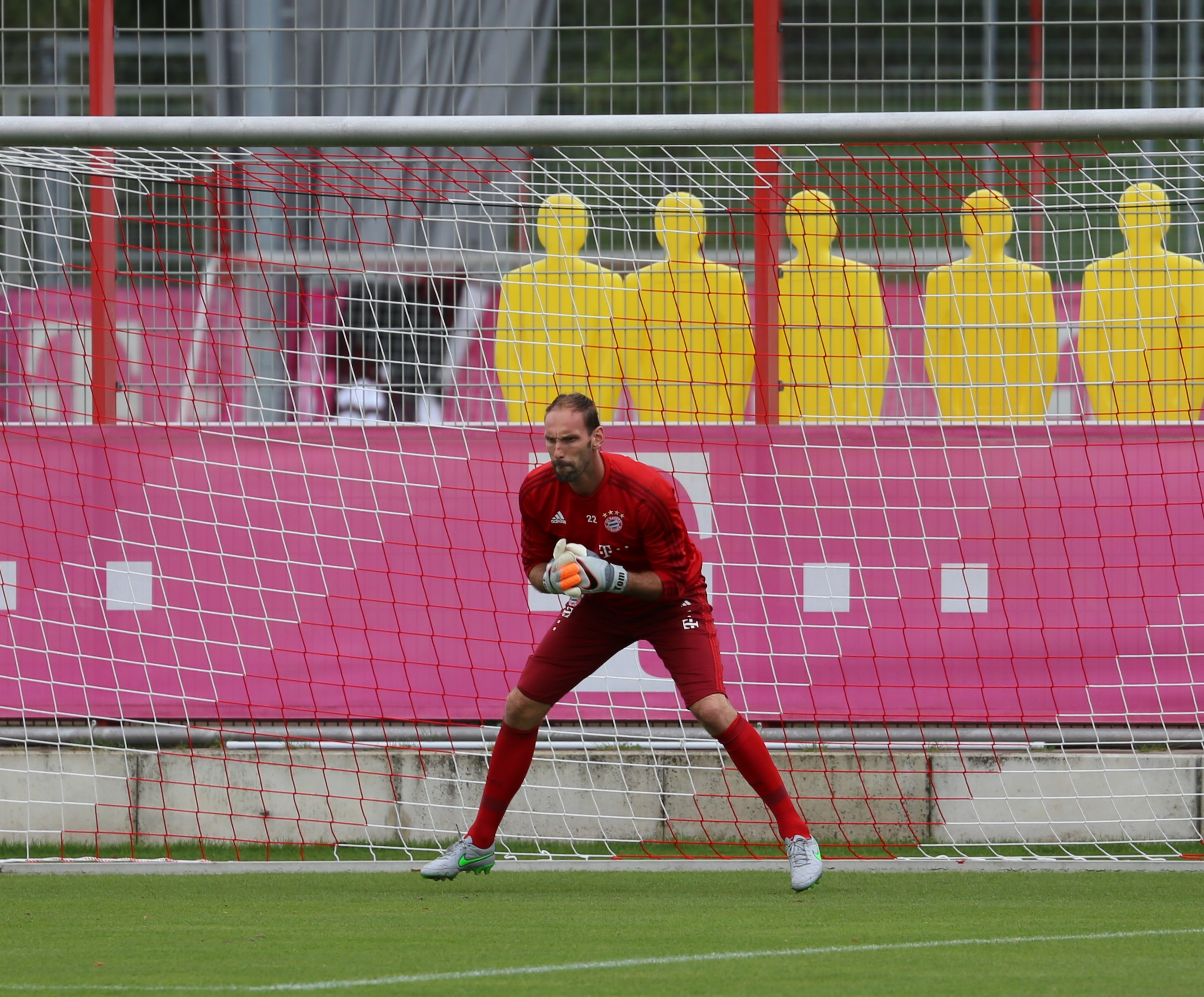 Tom Starke beim Training auf dem Gelände des FC Bayern München